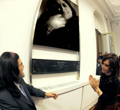 Fotografía de Mercedes Sosa junto a su hijo Fabián Matus y Cristina Fernández de Kirchner